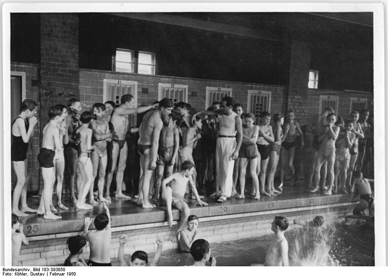 Aus der Arbeit eines Schwimmeisters. UBz: Die Arbeit eines Schwimmeisters im Berliner Stadtbad Lichtenberg. Viele Schulen kommen im Lauf des Tages zum Schwimmunterricht. Aufn.: Illus-Köhler 2 Leu. 5566-50 Febr. 50